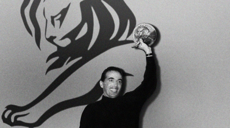 Carlos Souto gana el Leon de Plata en Cannes